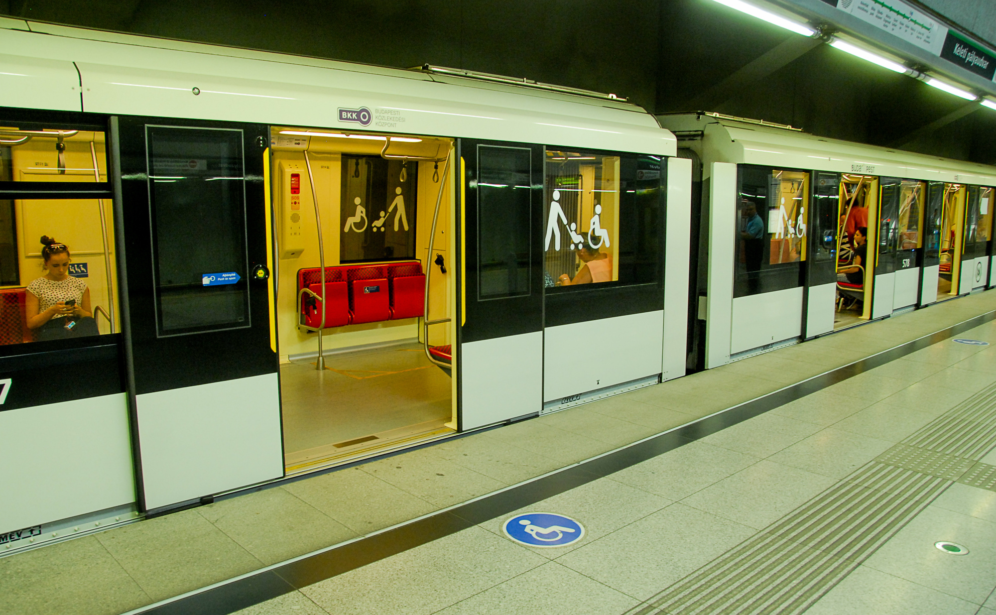 Selbstfahrende U-Bahn in Budapest im Sommer 2016